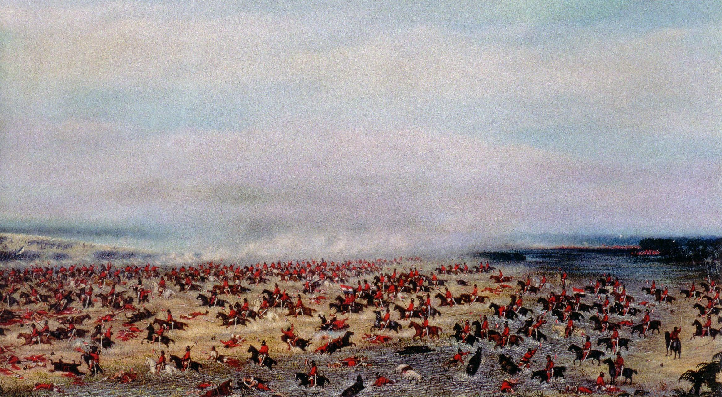 Episodio de la 2da División Buenos Aires en la batalla de Tuyutí, Mayo 24 de 1866, República del Paraguay (1876-1885)